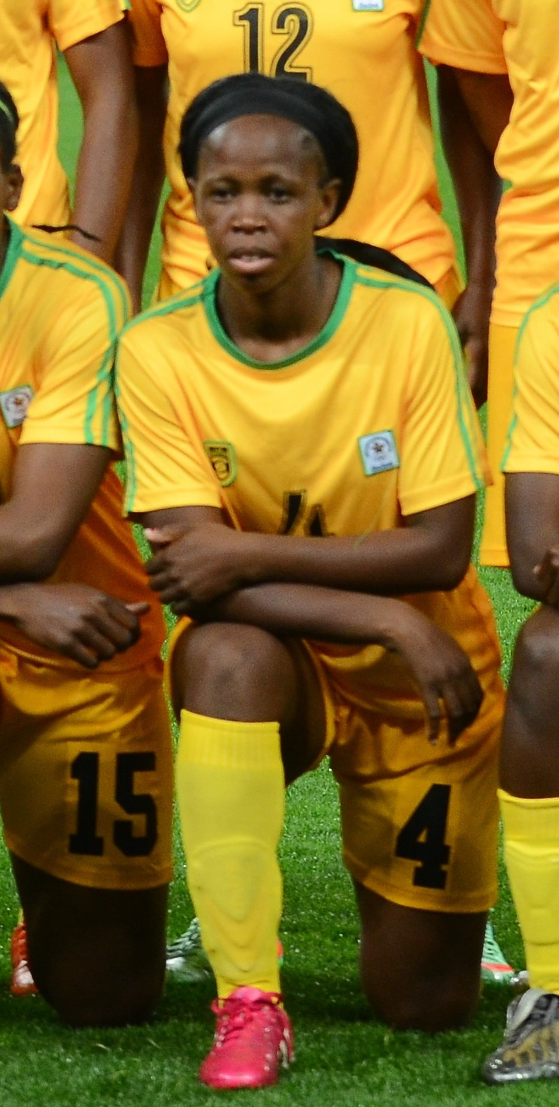 São Paulo - Seleções femininas do Zimbábue e da Alemanha se enfrentam na Arena Corinthians (Rovena Rosa/Agência Brasil)